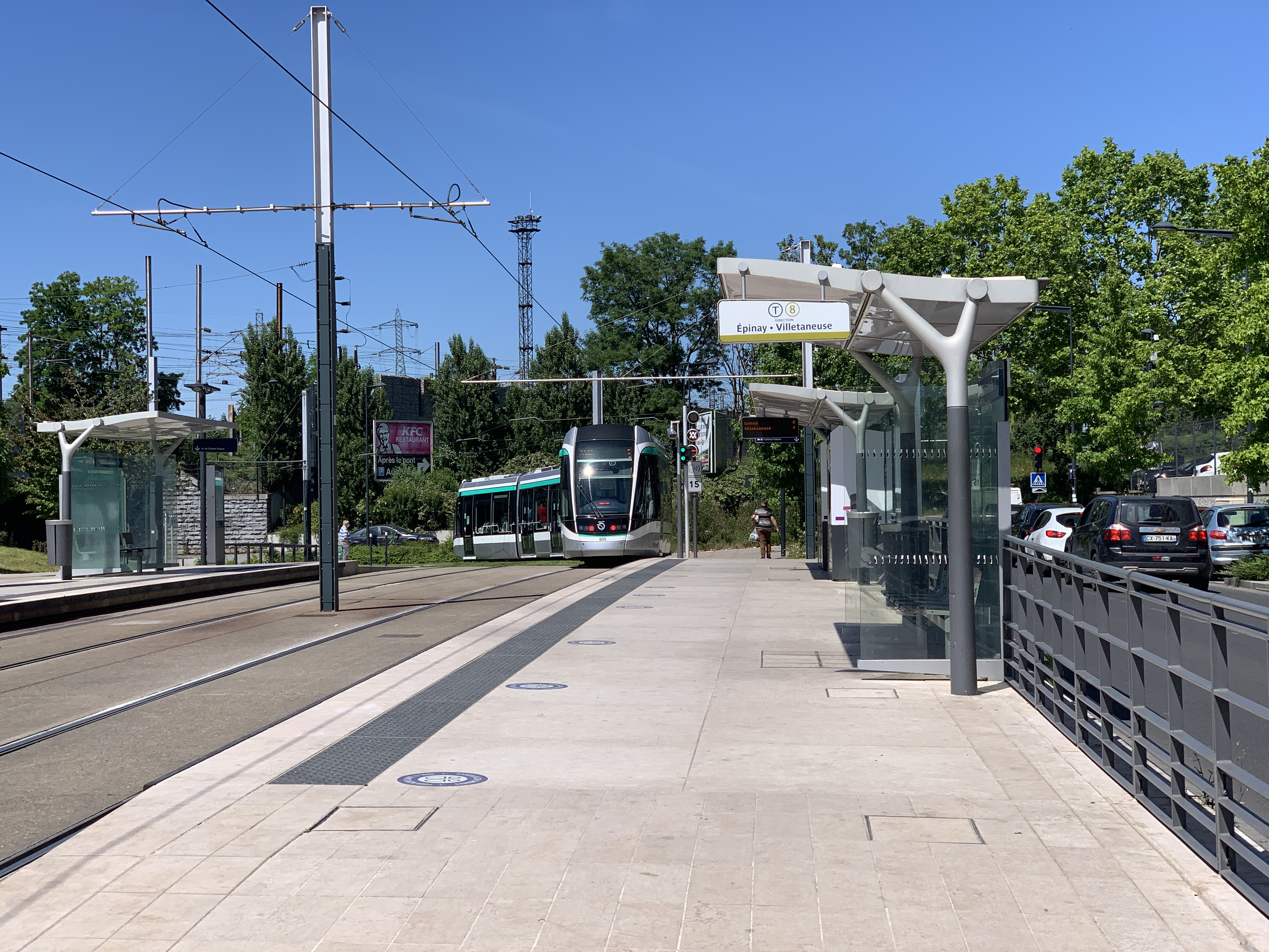 Station de tramway Delaunay-Belleville, ligne 8 du tramway d'Île-de-France, Saint-Denis, Seine-Saint-Denis.